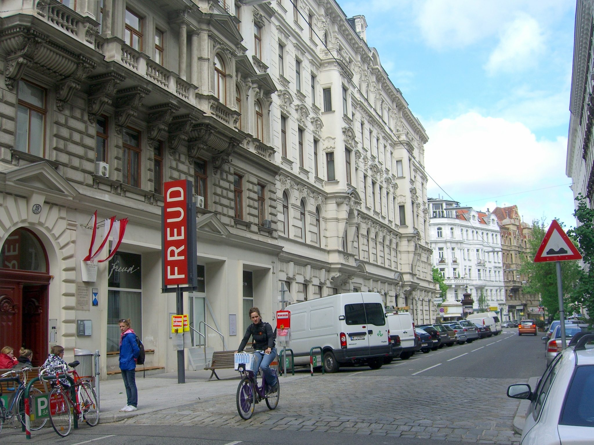 Vista de la calle Berggasse y del acceso al Museo Sigmund Freud de Viena.